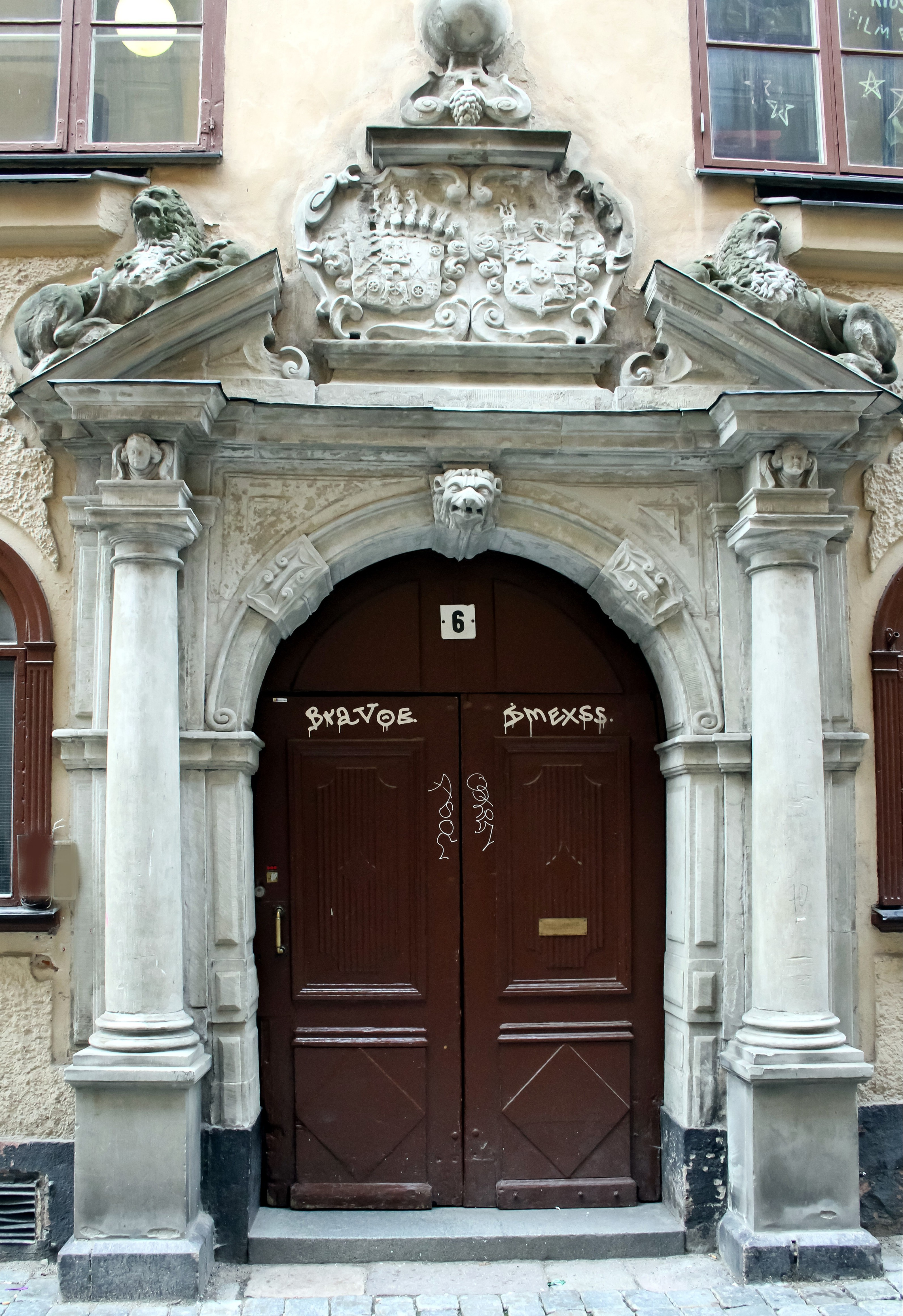 Gamla stan: Mäster Olofsgården; Portalen skulpterad på 1640-talet av Henrik Blume (Heinrich Blume). Coats of arms of Lewenhaupt and Cruus families